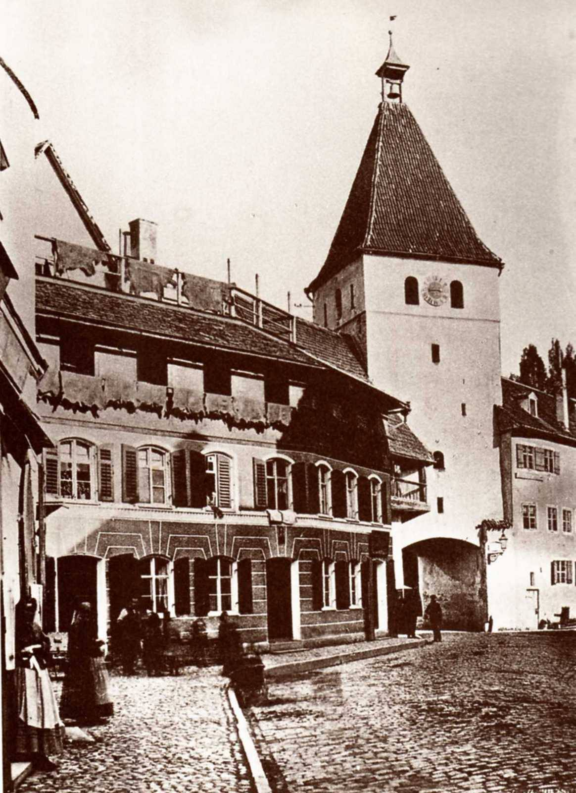 Illertor in Kempten vor dem Abriss